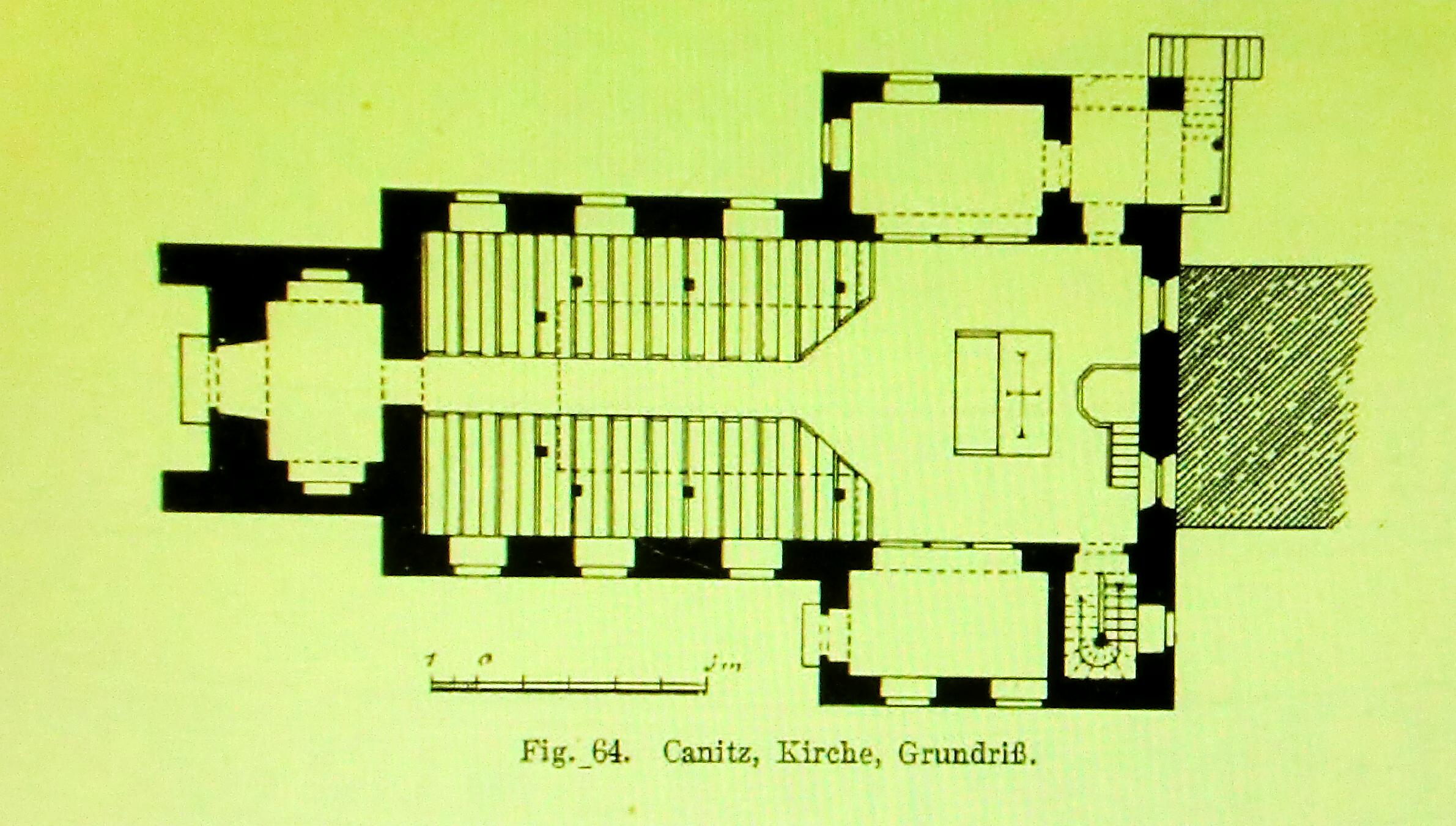 Kirche Canitz: Grundriss. Aus: Bau und Kunstdenkmäler des Königreiches Sachsen, Heft 27, Amthauptmannschaft Oschatz, bearbeitet von Cornelius Gurlitt, Verlag Meinhold und Söhne 1910, S. 61. online